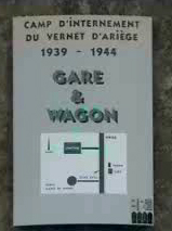 camp internament Vernet d'Ariège